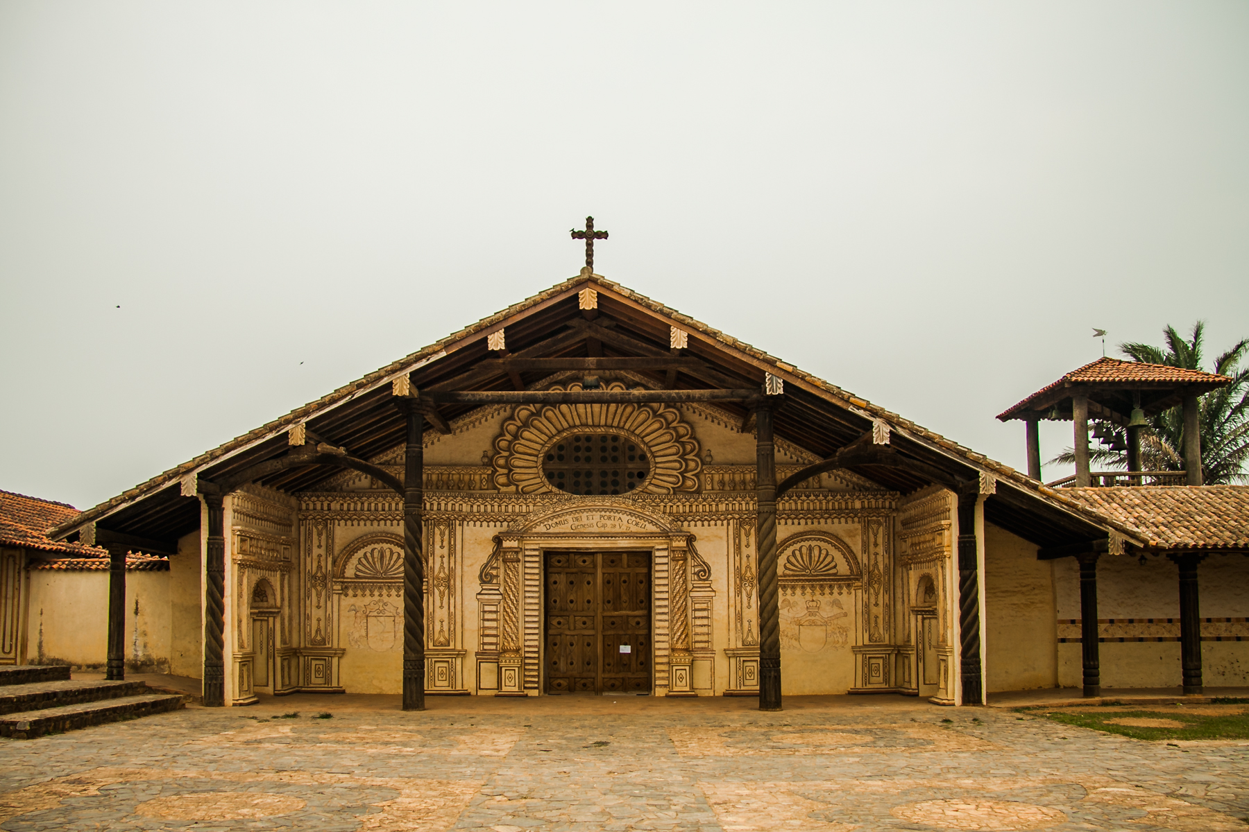 Templo de San Javier This medium shows the protected monument with the number S/00-039 in Bolivia.